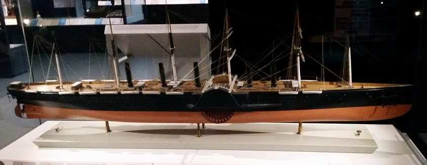 ロンドン科学博物館のグレート・イースタンの模型